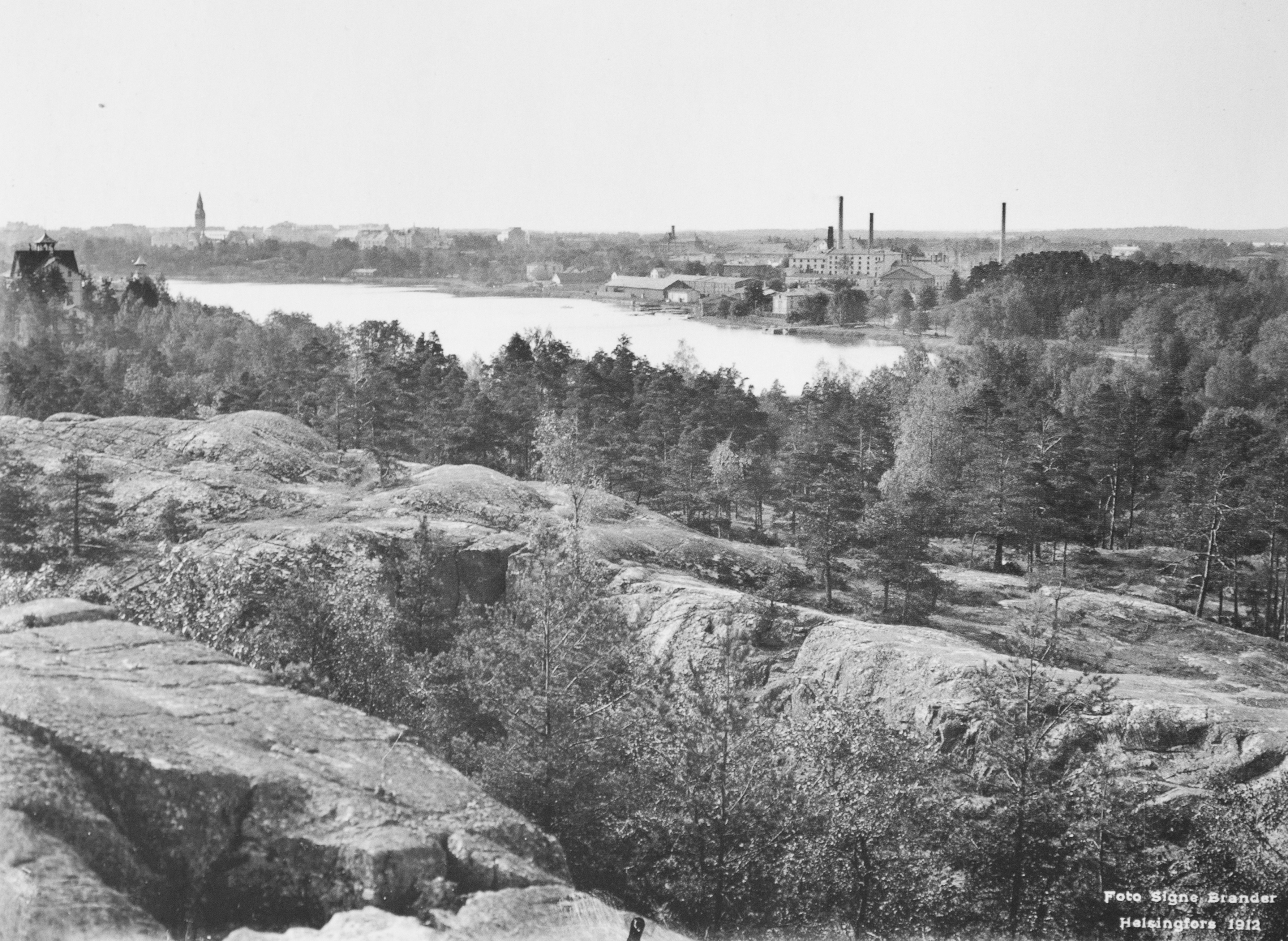 Alppilan kalliolta kuvattu näkymä Töölönlahteen.